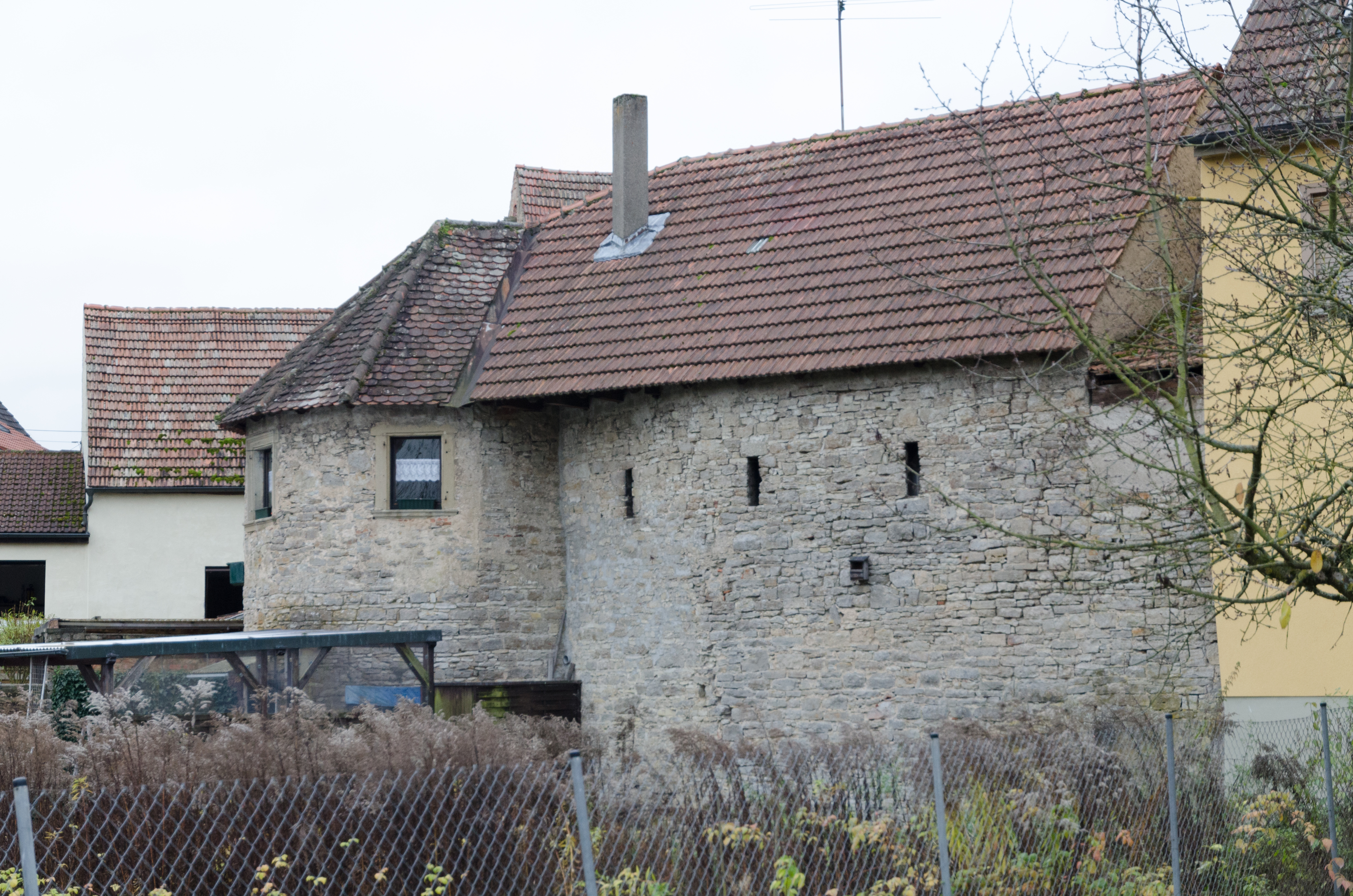 Volkach, Stadtmauer, Am Zeilitzheimer Tor 1